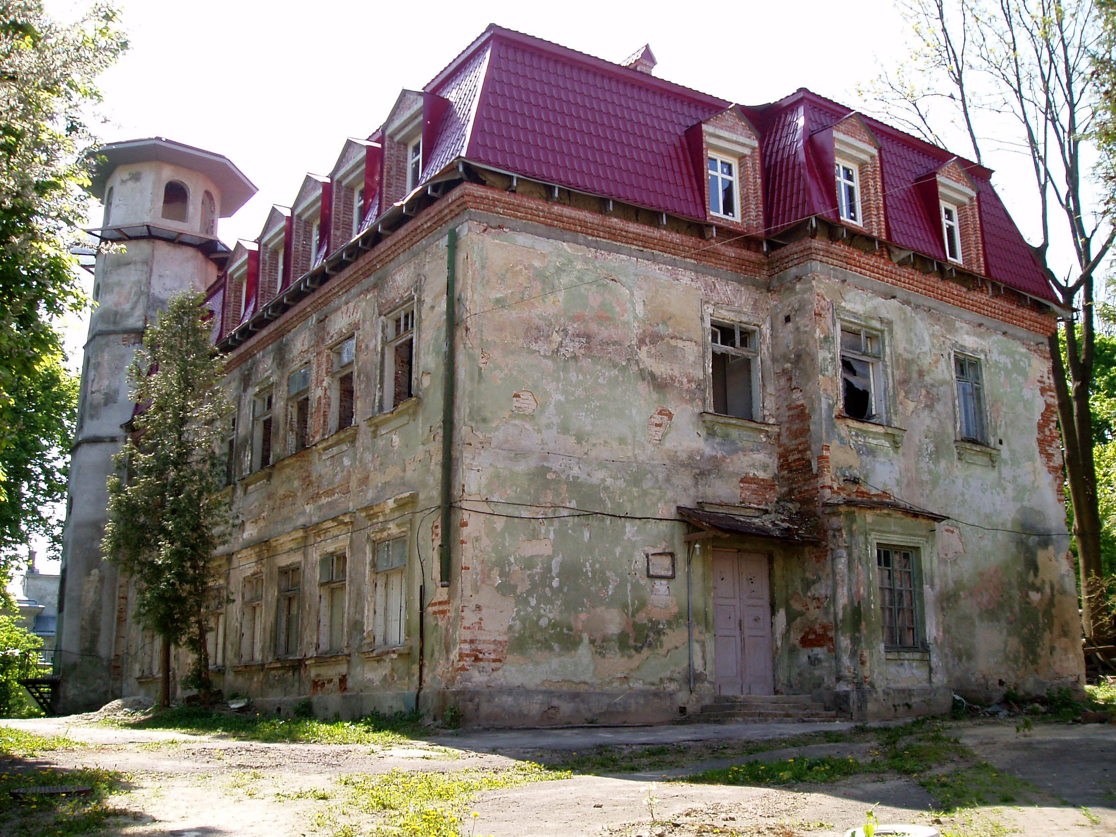 Будинок на вулиці Драгоманова, 19 у Львові. Збудований у 1848 році можливо за проектом Карла Гунґлінґера.